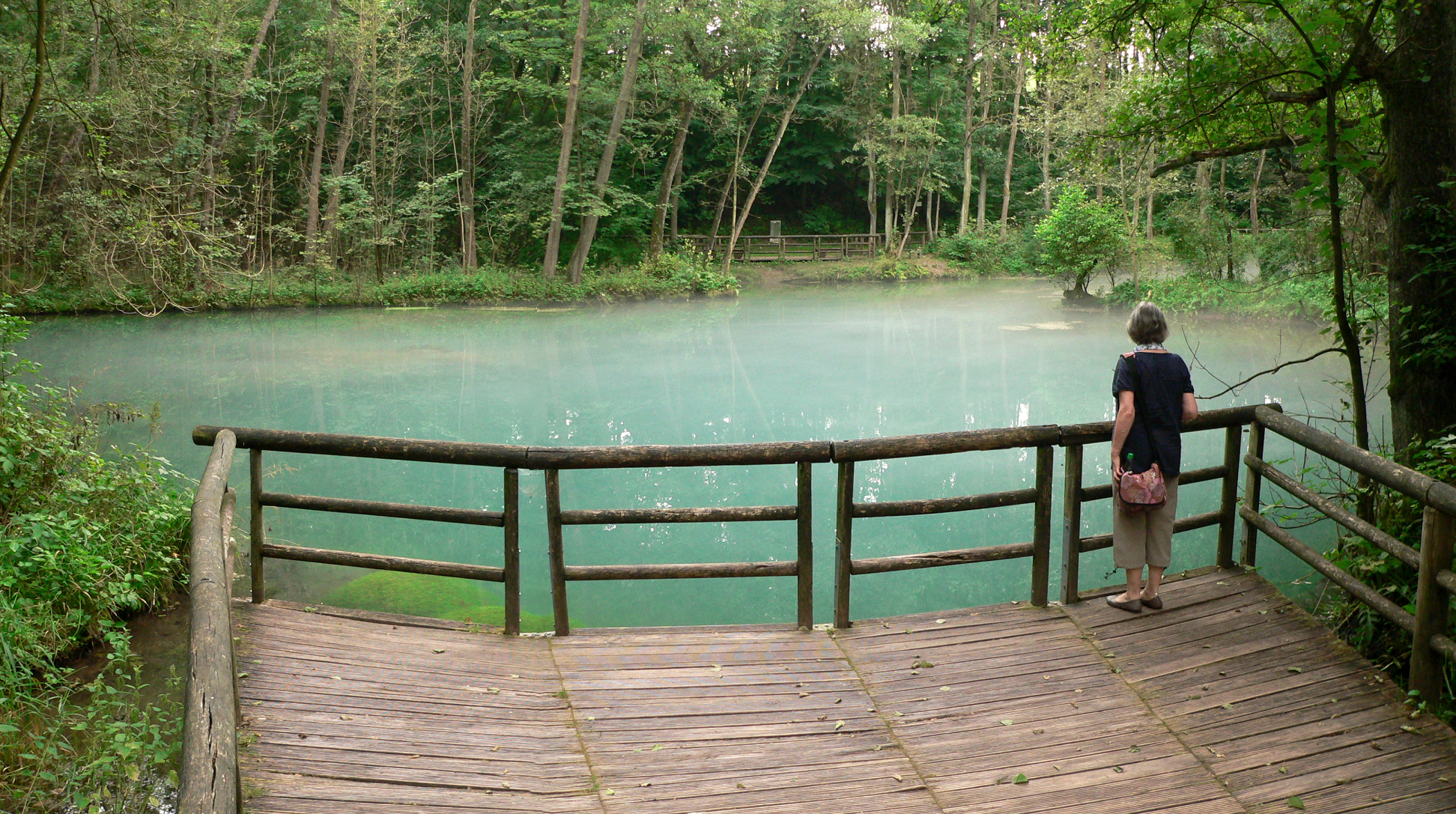 Aussichtsplattform am Quelltopf der Rhumequelle (Naturdenkmal und Nationales Geotop) bei Rhumspringe innerhalb des Naturschutzgebietes Rhumeaue / Ellerniederung / Gillersheimer Bachtal